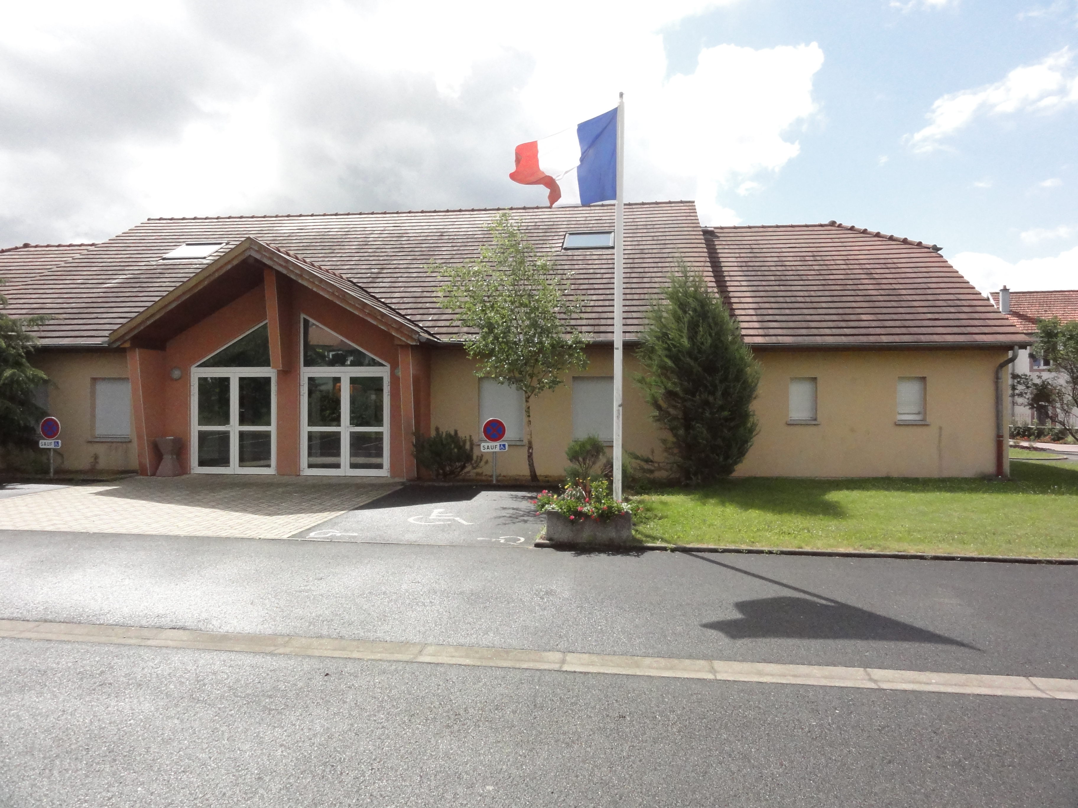 Hilbesheim (Moselle) salle communale